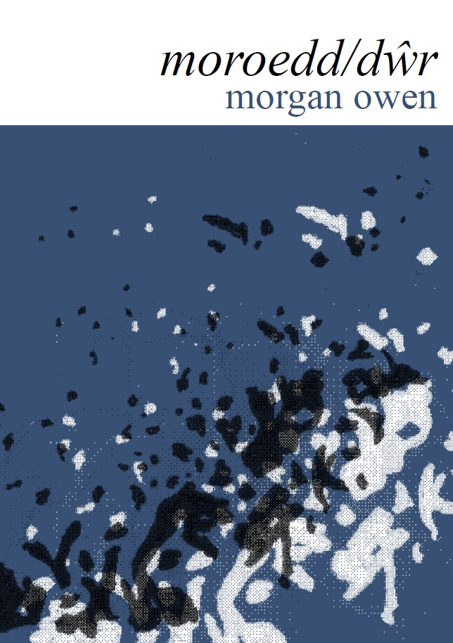 Clawr moroedd/dŵr, pamffled o gerddi gan Morgan Owen a gyhoeddwyd gan Gyhoeddiadau'r Stamp